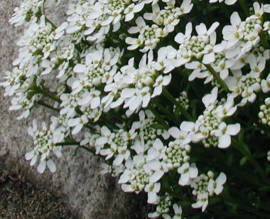 Iberis sempervirens